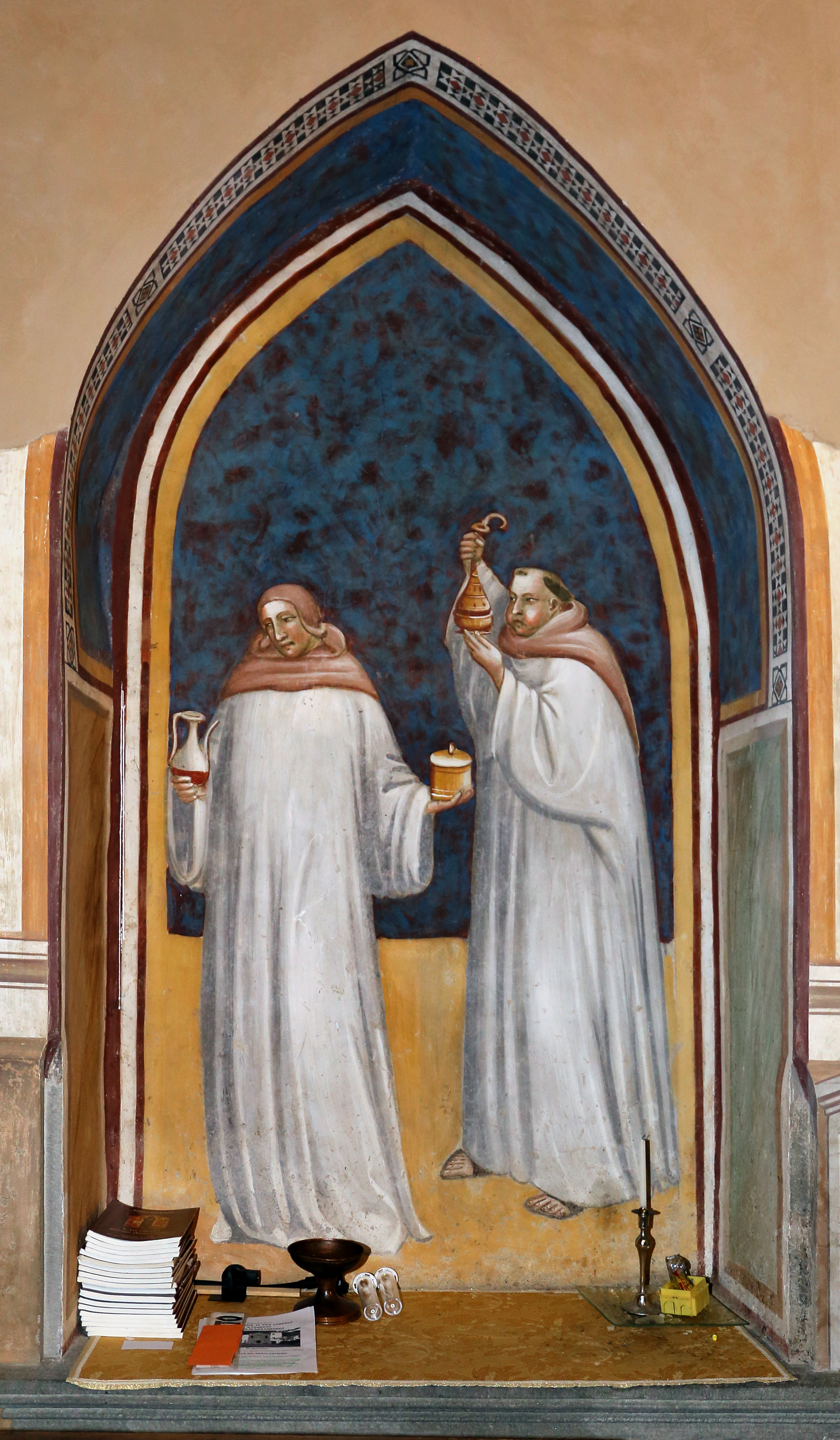 Chiesa di San Francesco This is a photo of a monument which is part of cultural heritage of Italy.